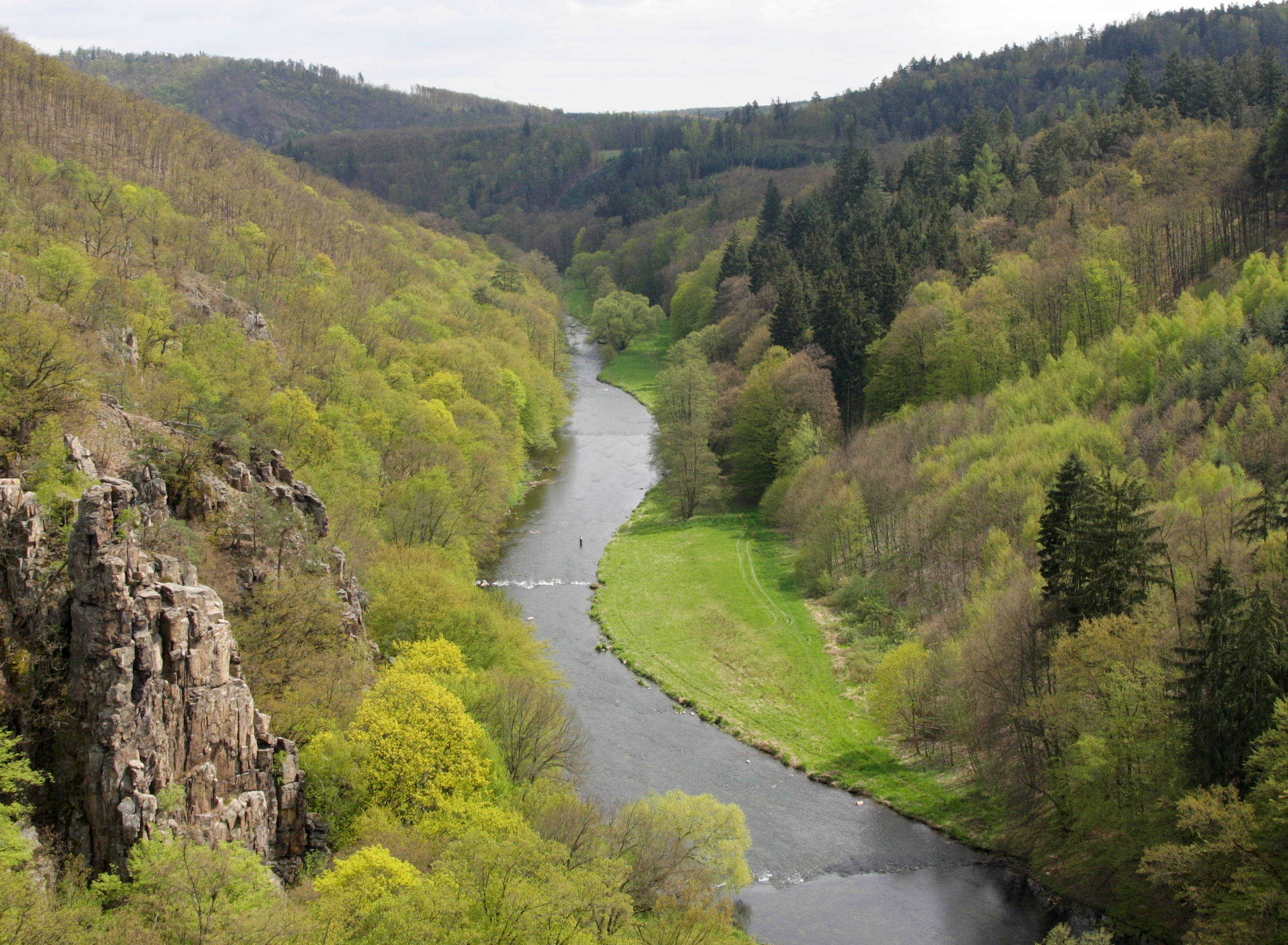 Lhánice - řeka Jihlava z vyhlídky Na Babách.